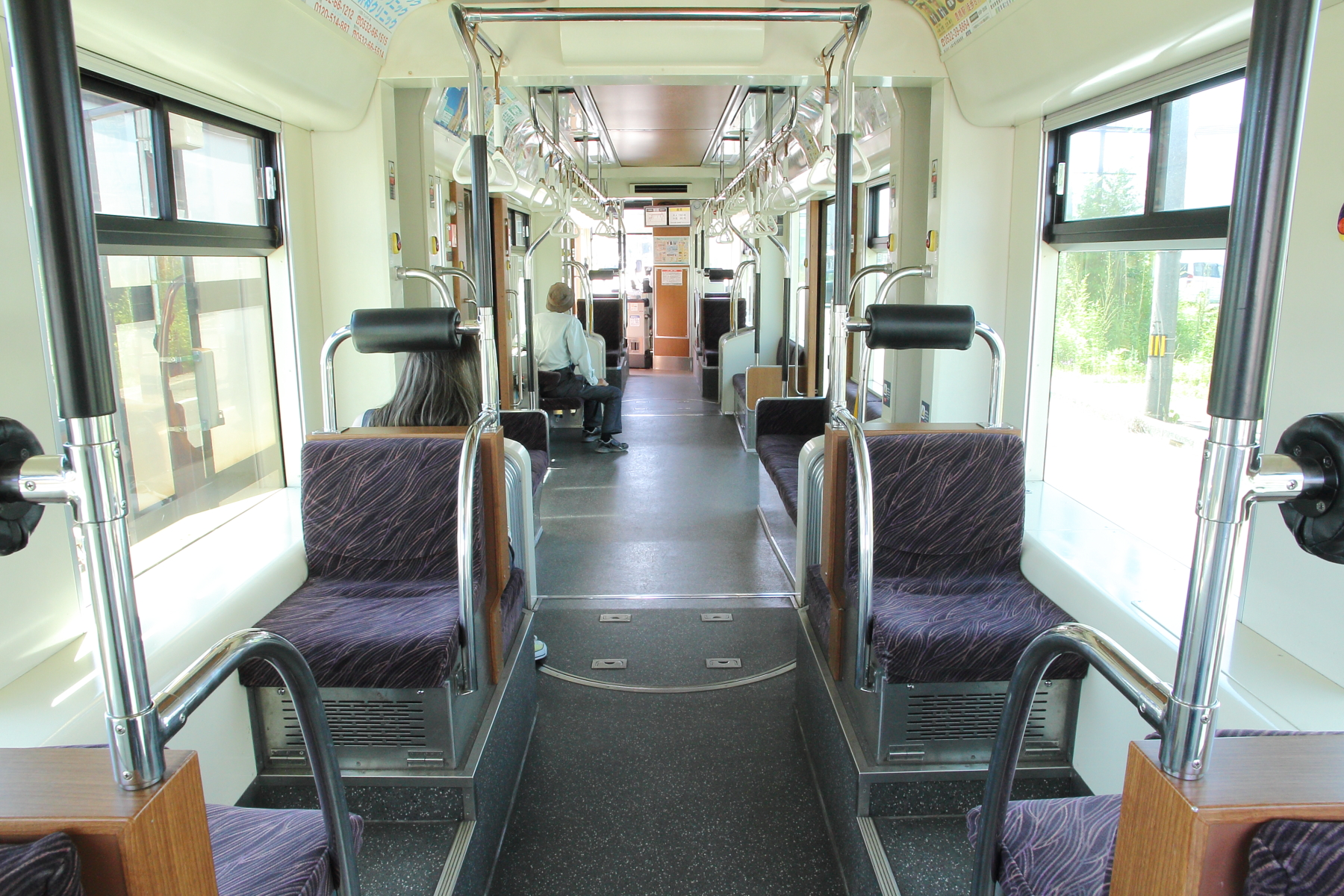 豊橋鉄道T1000形 (T1001) の車内